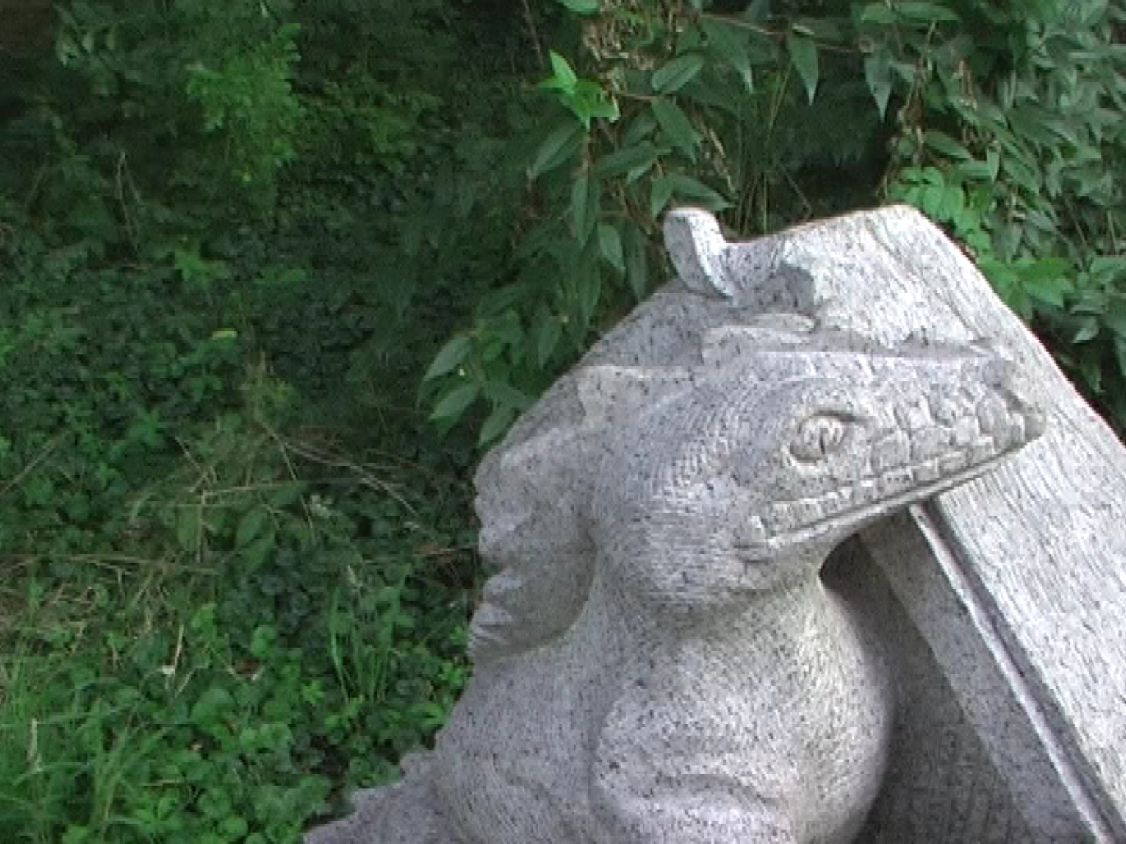 Plon w lěkowanskim a powěsćowym parku, Borkowy (Błóta)